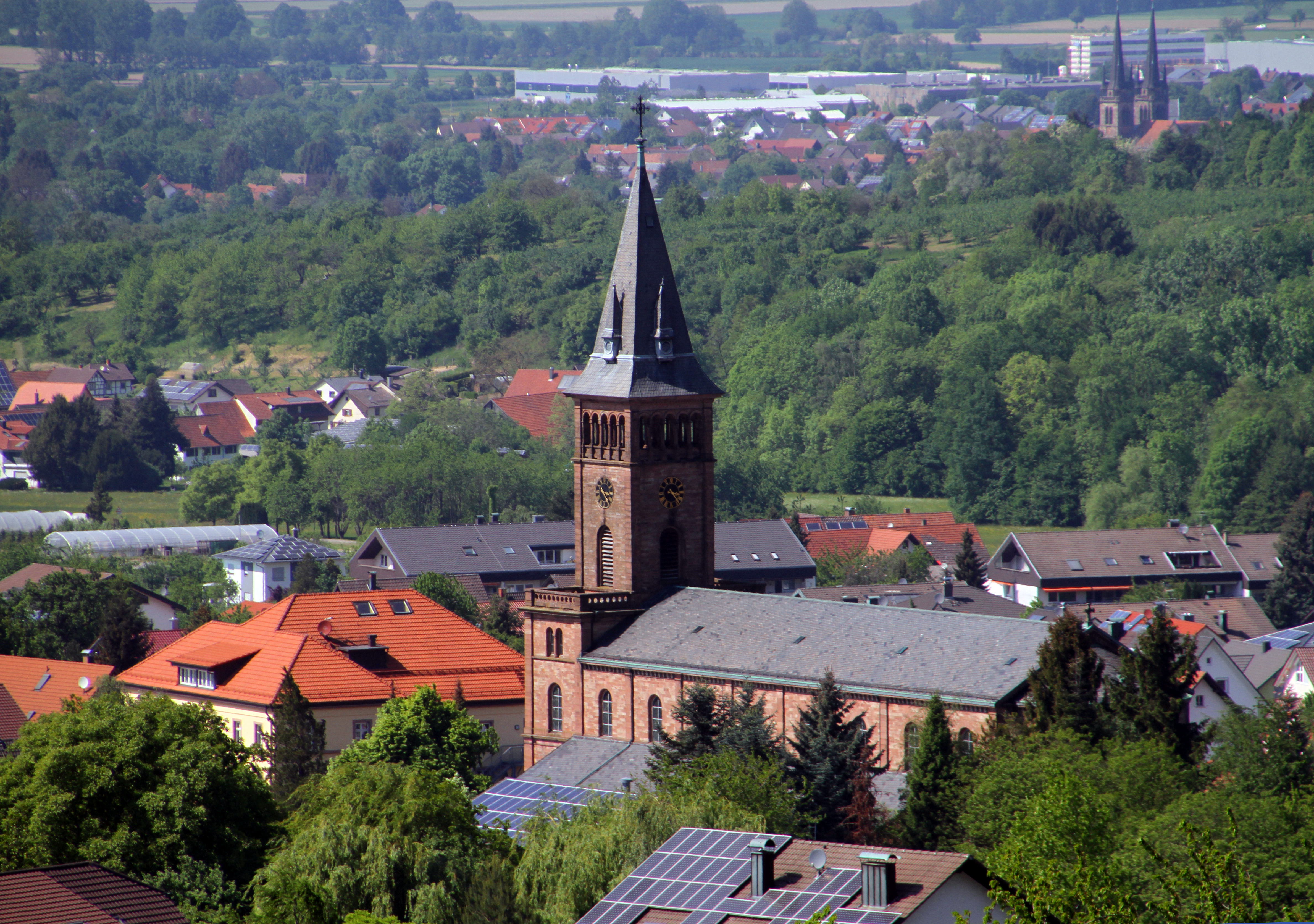 Lauf (Baden)